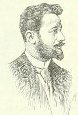 Leon Serpollet